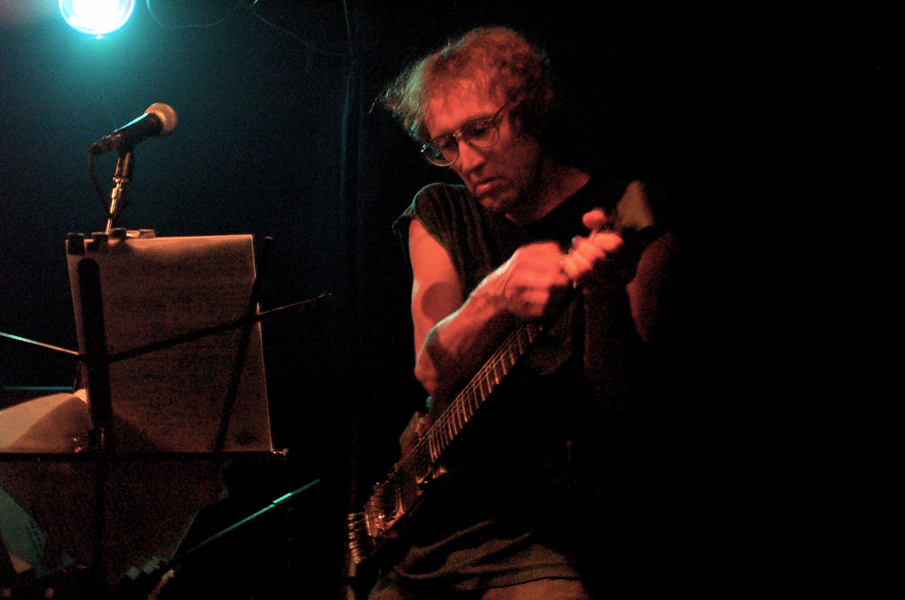 Michael Yonkers (DeStijl/Freedom From Festival 2003)